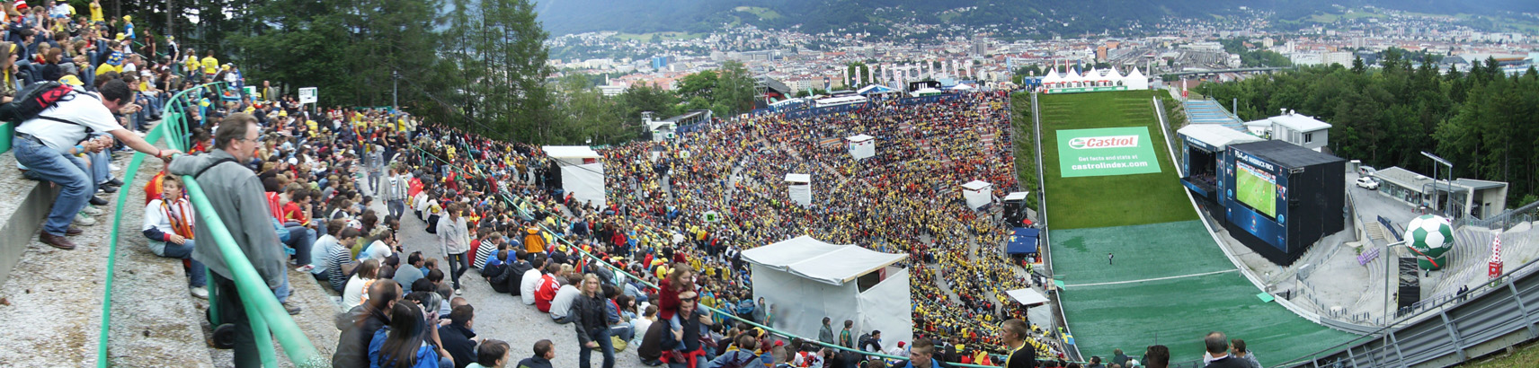 Die Fußball-Europameisterschaft 2008, Fanzone Innsbruck Bergisel am 14. Juni während des Gruppenspiels Schweden gegen Spanien